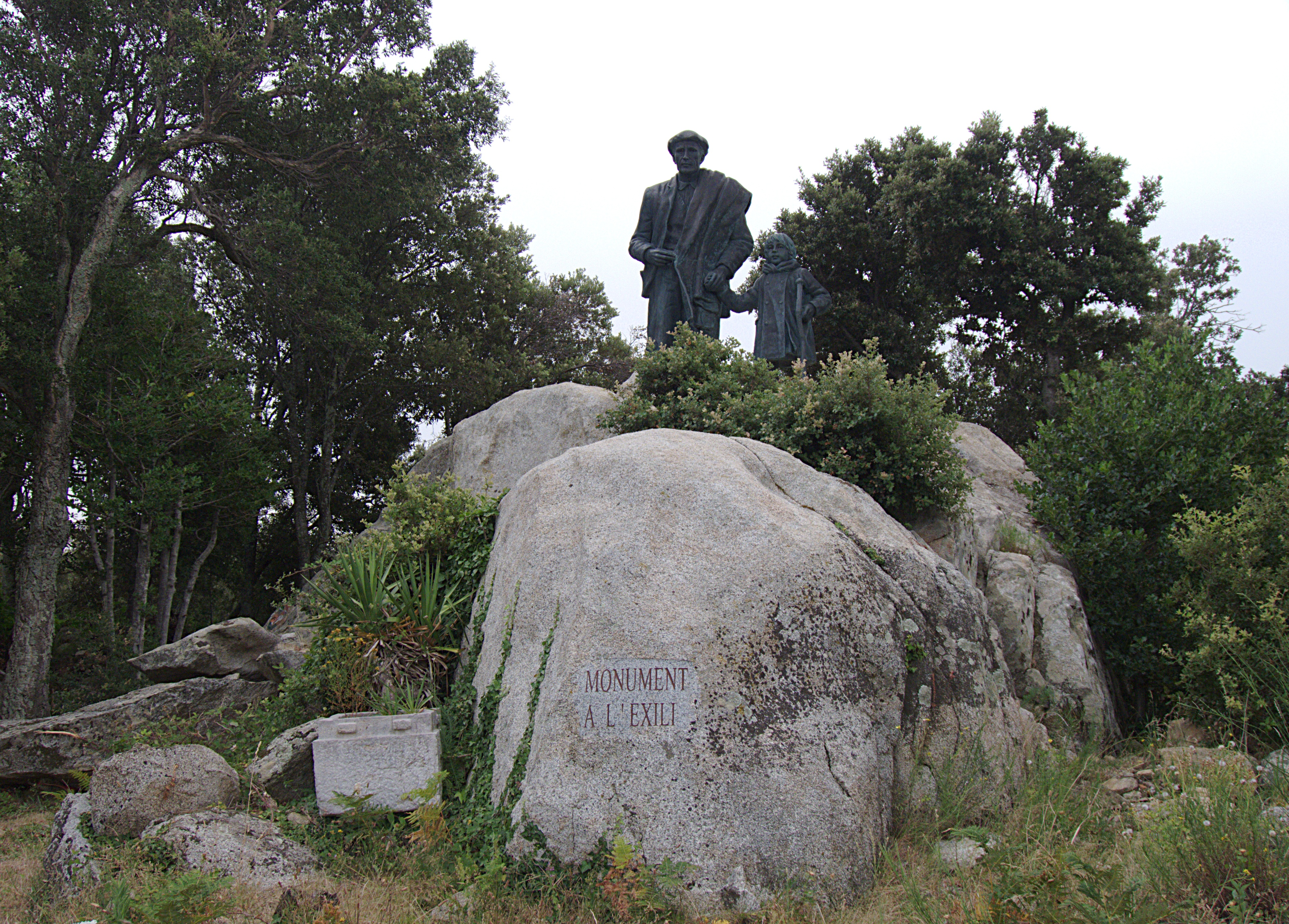 Monument de l'exil, La Vajol (Haut-Ampurdan, Gérone, Catalogne, Espagne)